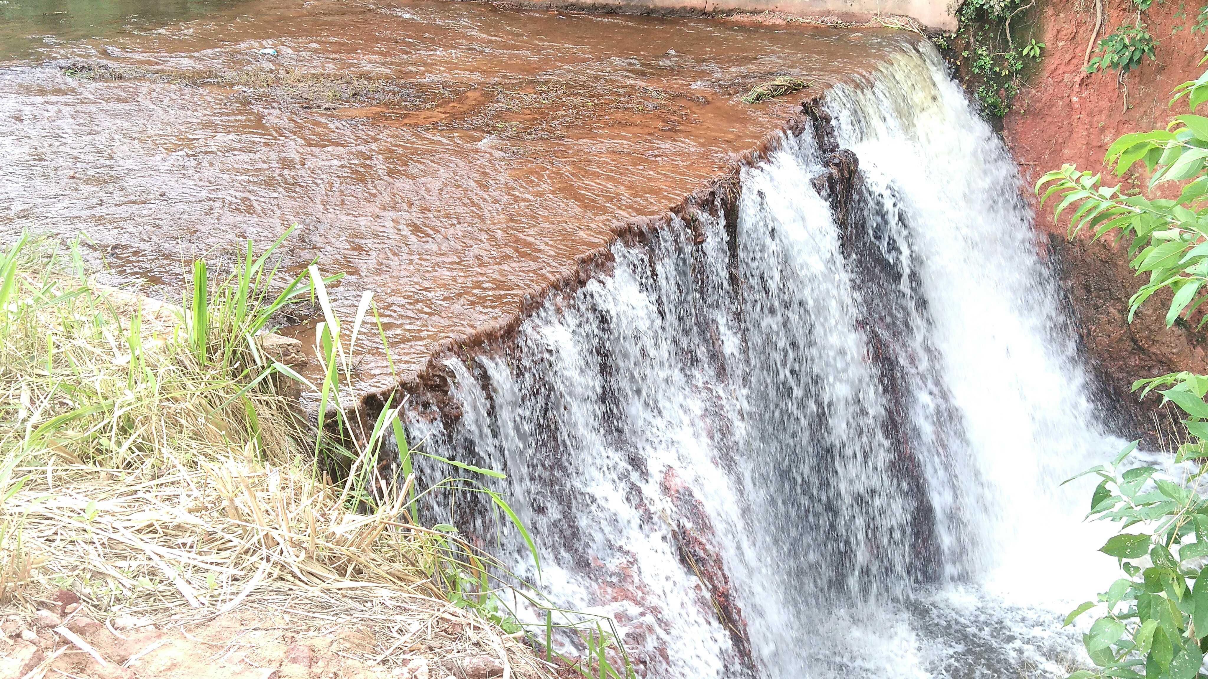 Cachoeira do Açude Lourenção